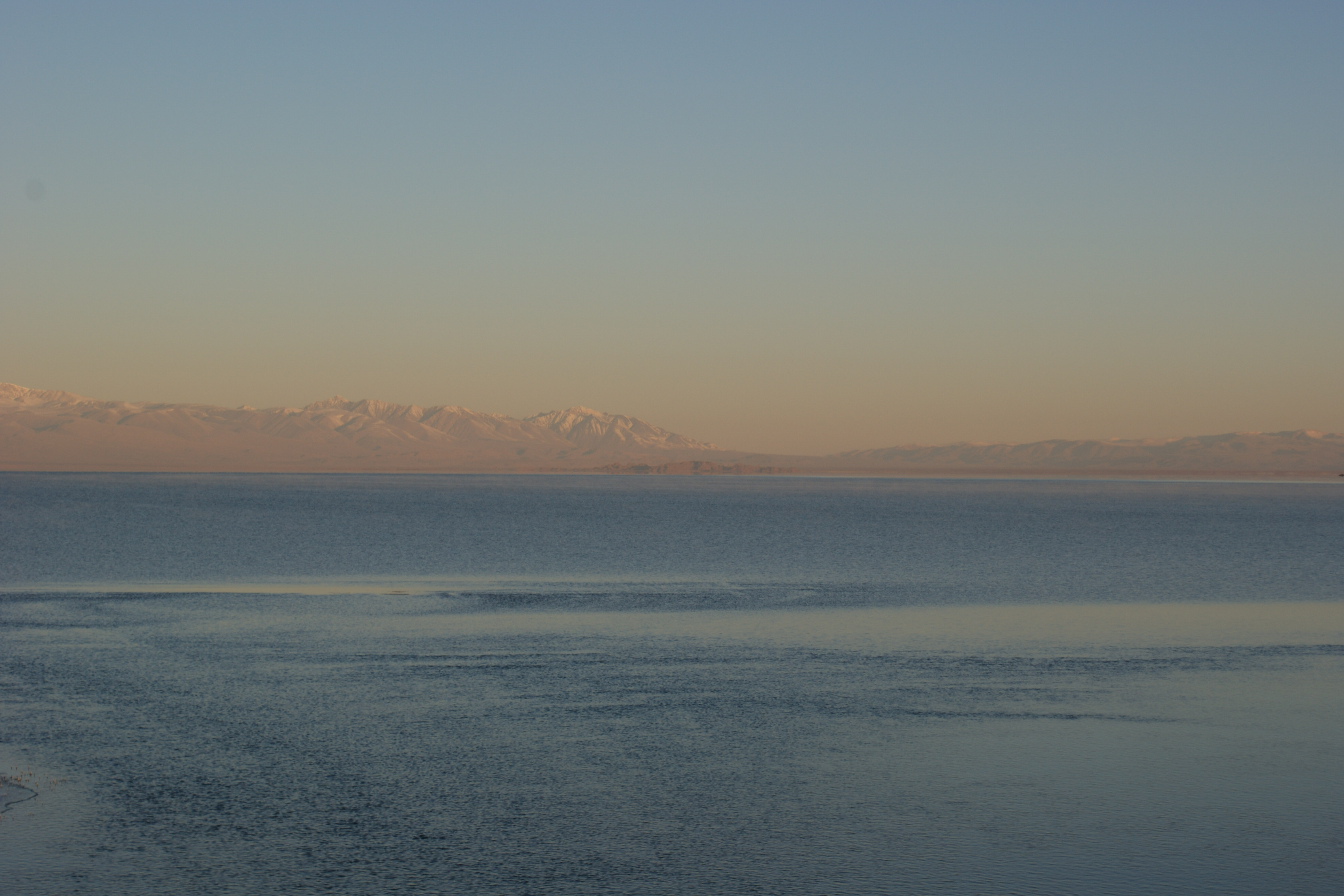 Ачит нуур 2010 он 10-р сард